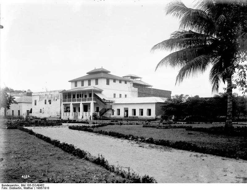 Aus Pangani